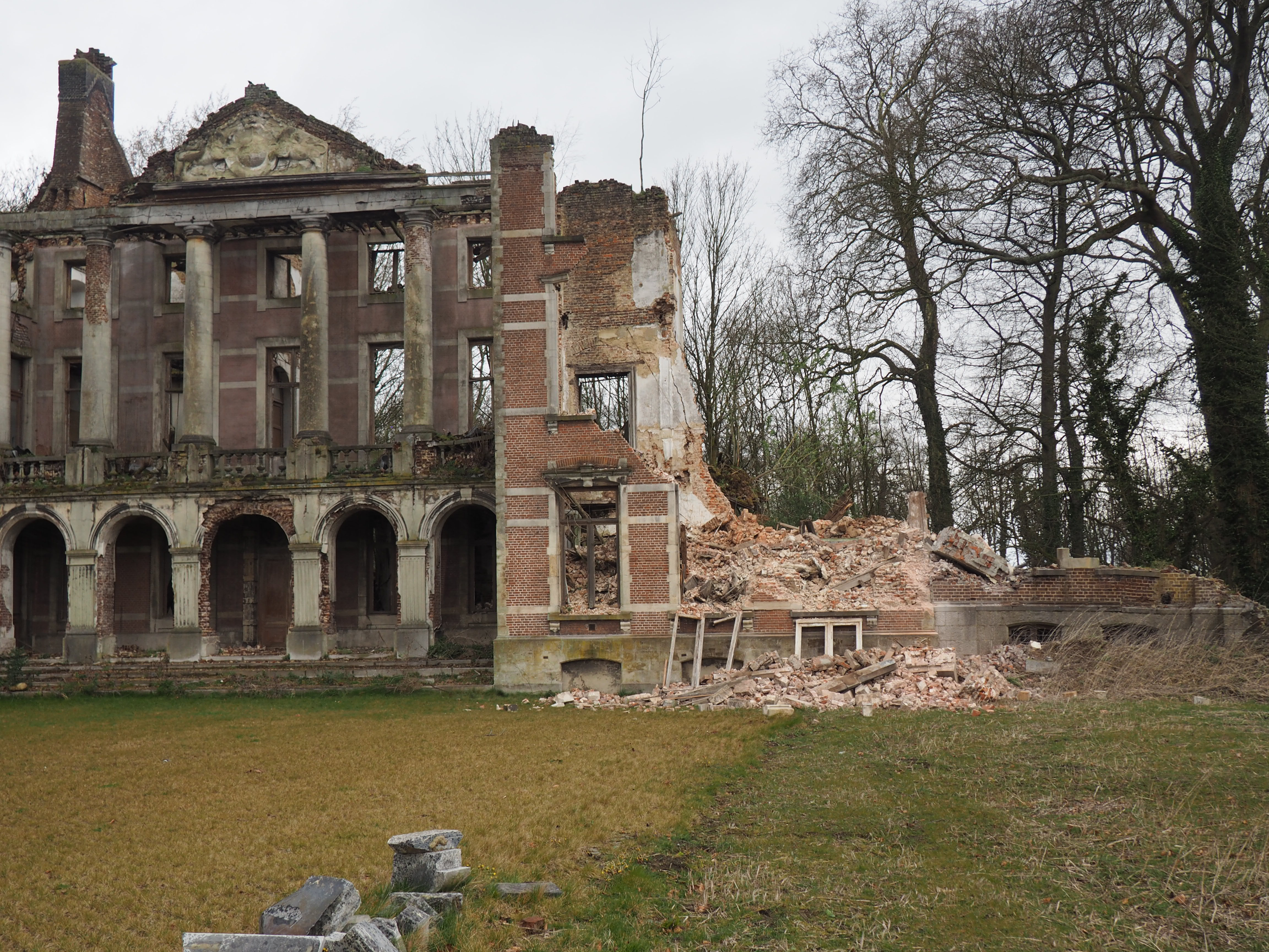 Het Markizaat van Lede. Woonst van Markiezenfamilie Bette 1748 (Door sommigen onterecht Kasteel van Mesen genoemd. Stad Mesen ligt niet in Lede en Mesen heeft geen kasteel). Gemeente Lede plant de dringende consolidatie van de ruïne in de nabije toekomst.